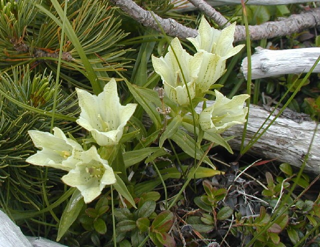 Gentiana algida Pall. (1789)